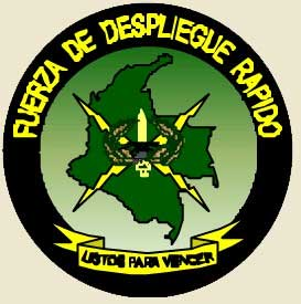 LOGO FUDRA